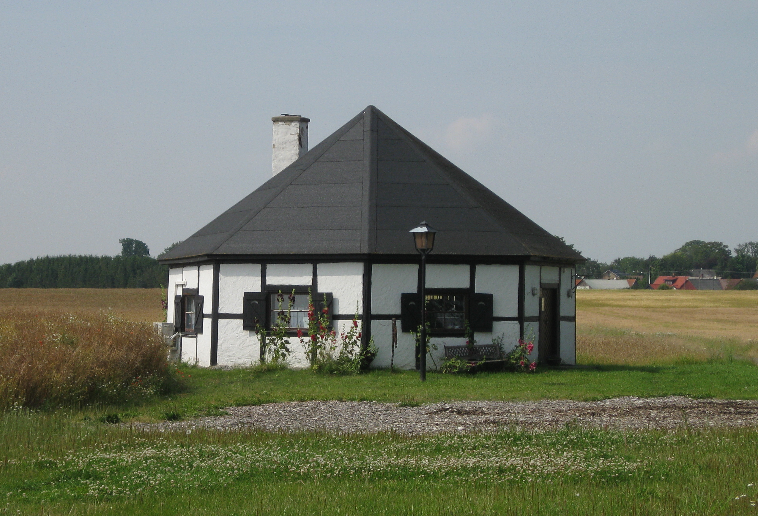 Åttakantigt korsvirkeshus, av någon anledning kallad fyrkappa. Någon kilometer söder om Ingelstorp.